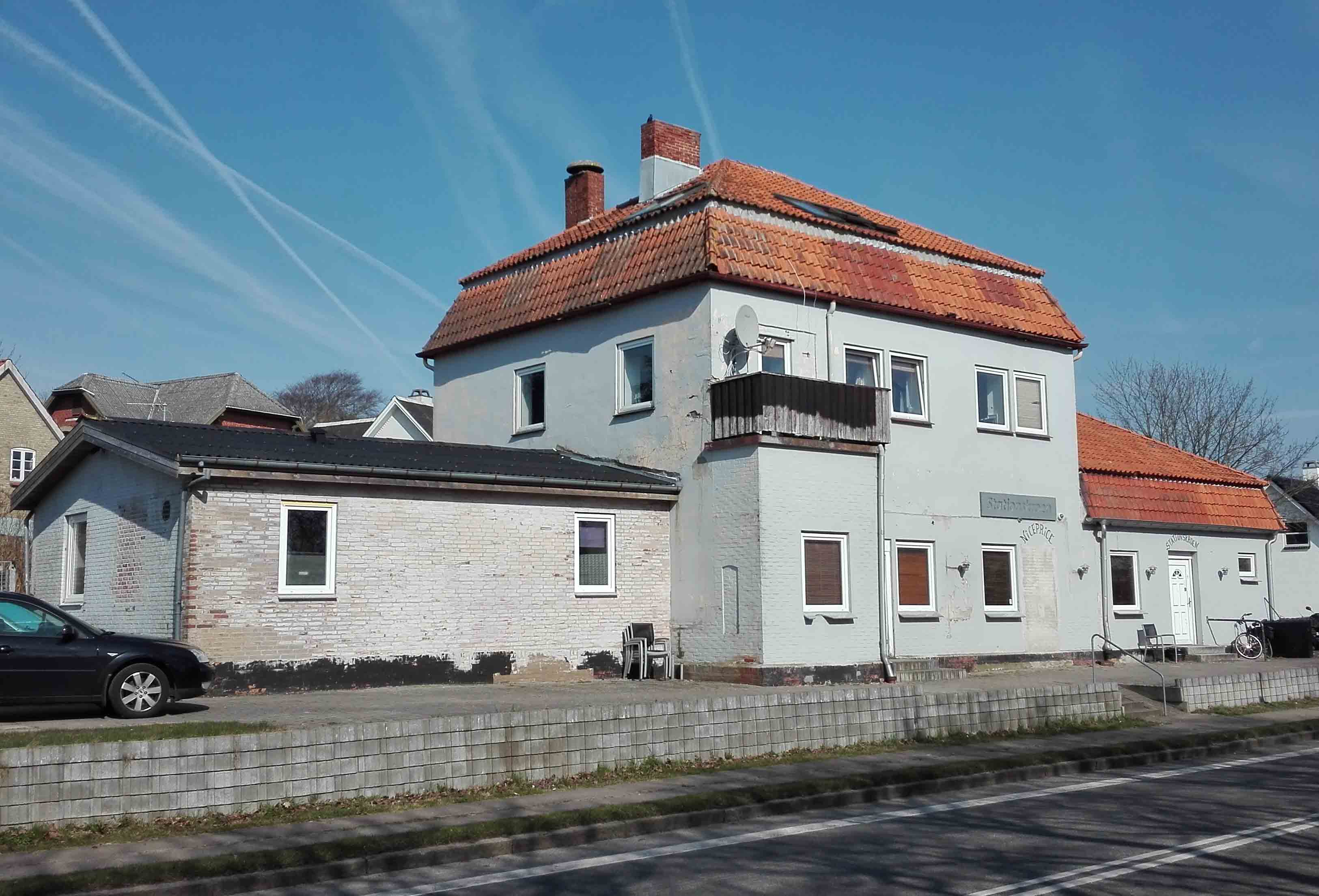 Broager Station, sporsiden fra sydvest